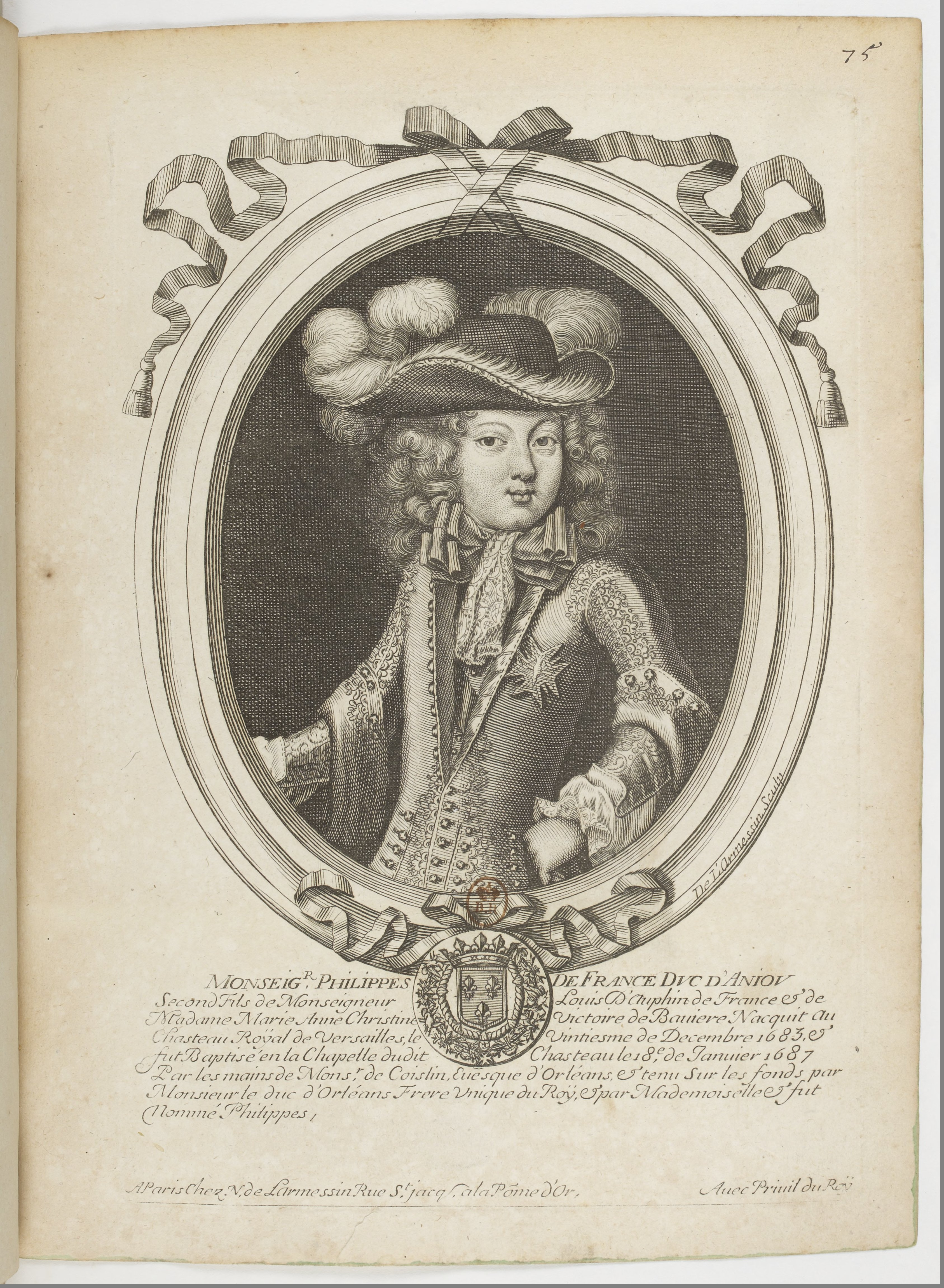 Les augustes représentations de tous les rois de France, depuis Pharamond jusqu'à Louis XIV,... avec un abrégé historique sous chacun, contenant leurs naissances, inclinations et actions plus remarquables pendant leurs règnes